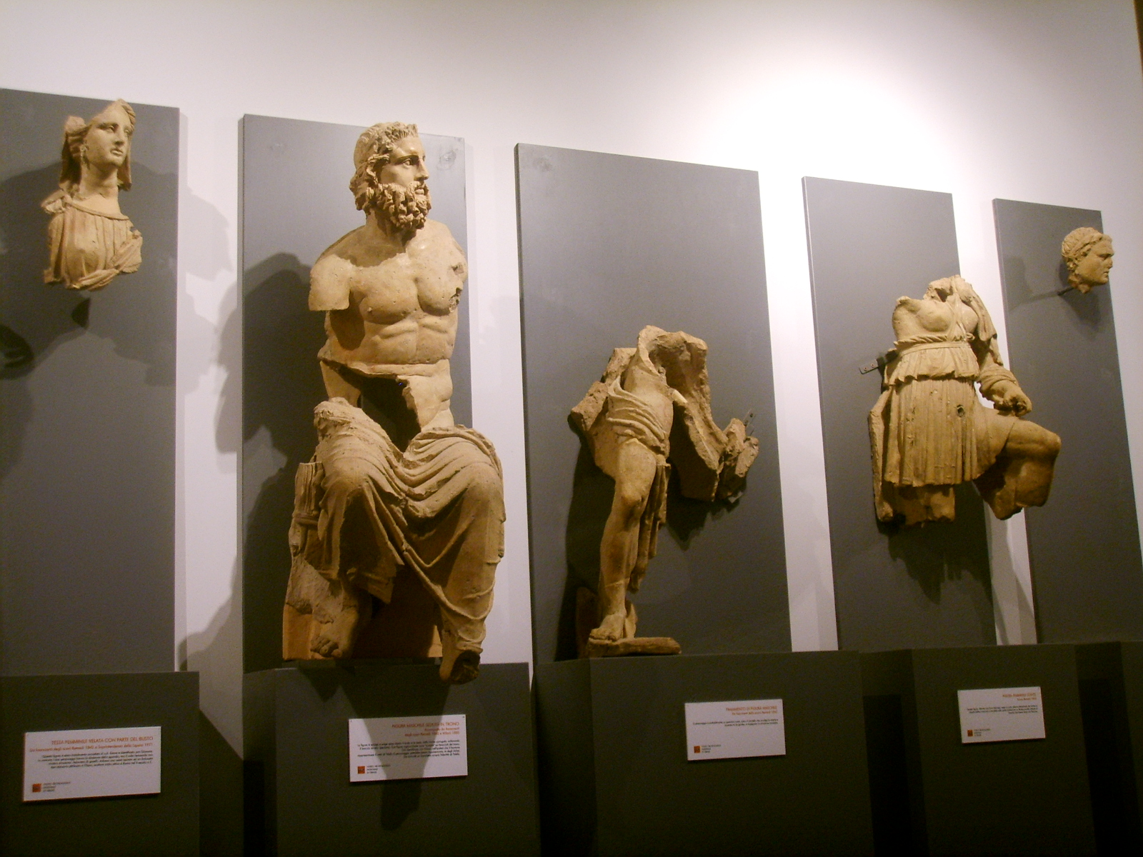 Frontone di Luni. Opera di arte etrusca, esposta al Museo archeologico di Firenze. Museum in Florence